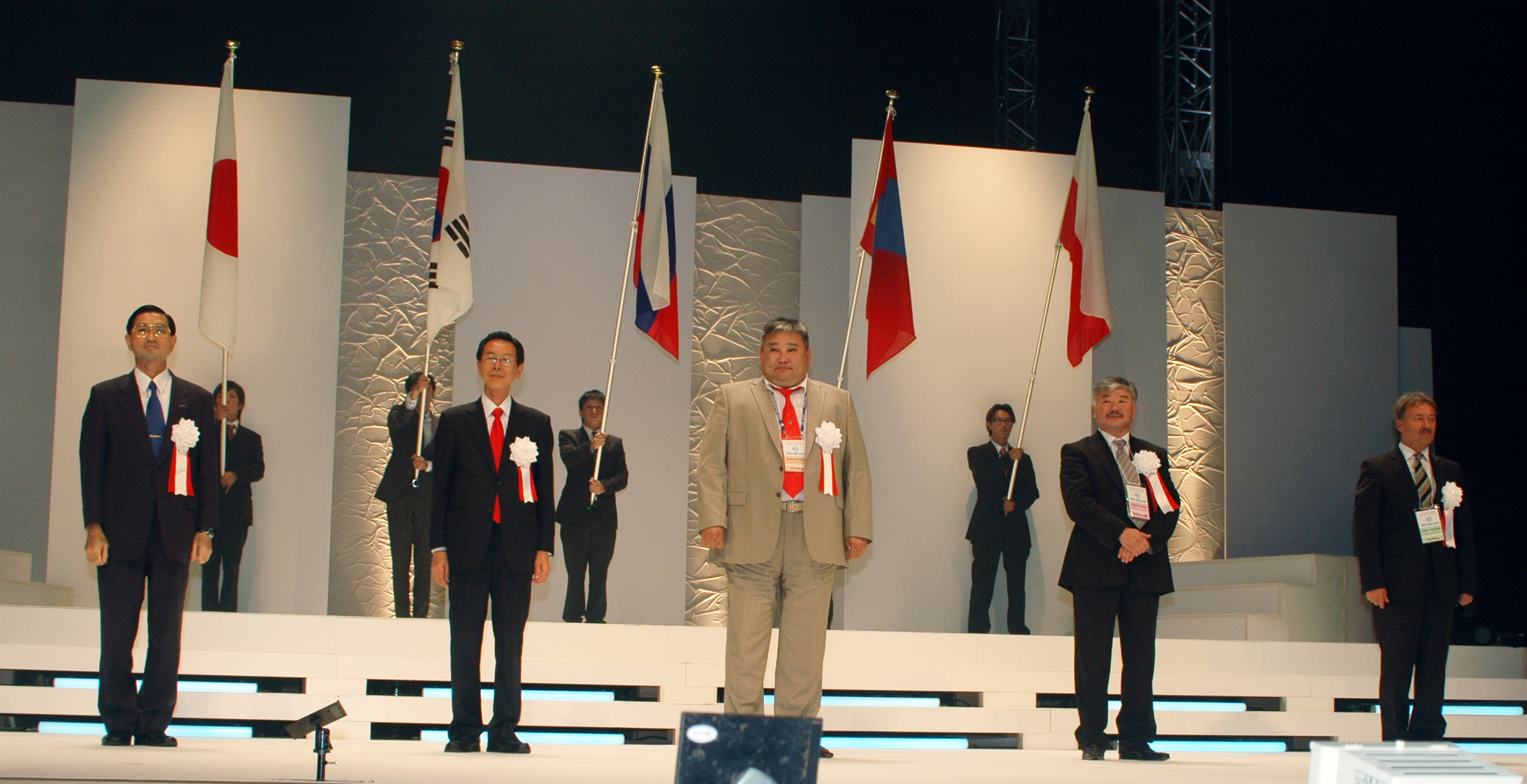 Представители глав телекомпаний на открытии награждения в Японии, Миоконоджа